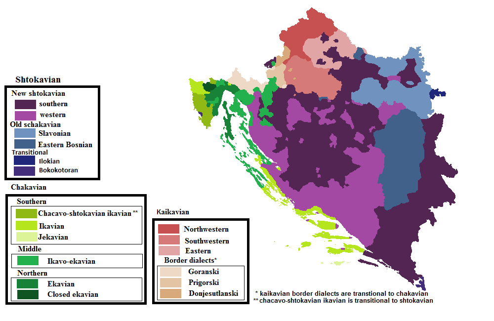 Hrvatski dijalekti u RH i BiH